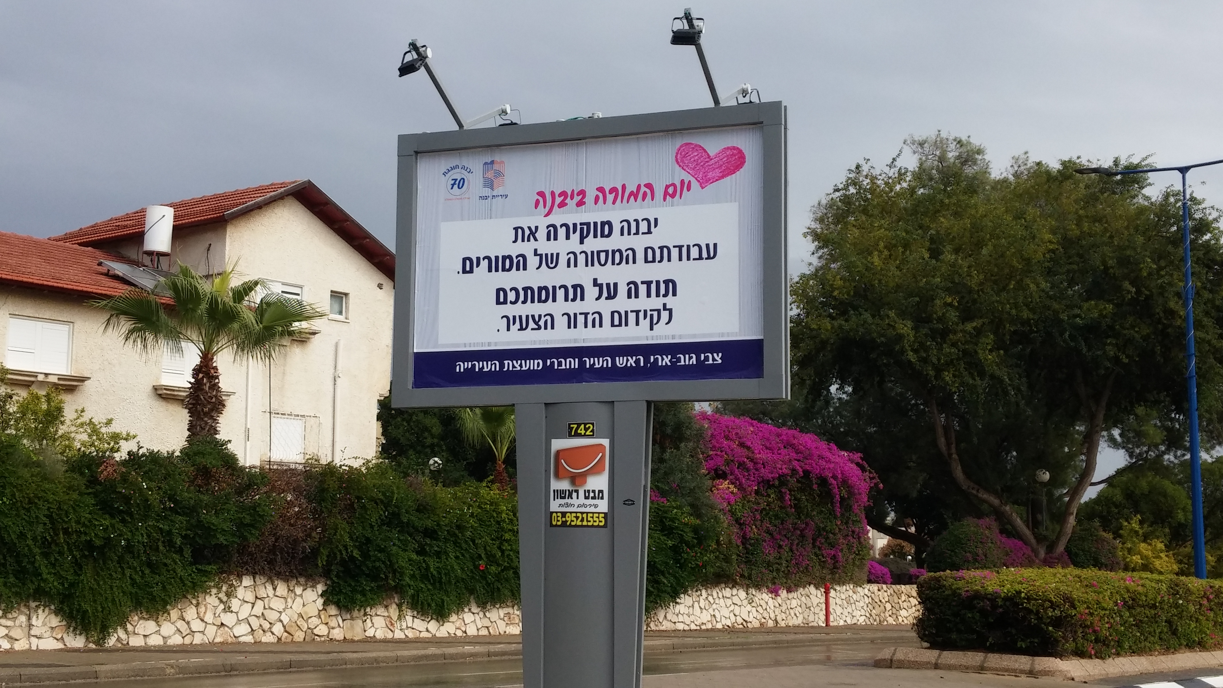 יום המורה ביבנה